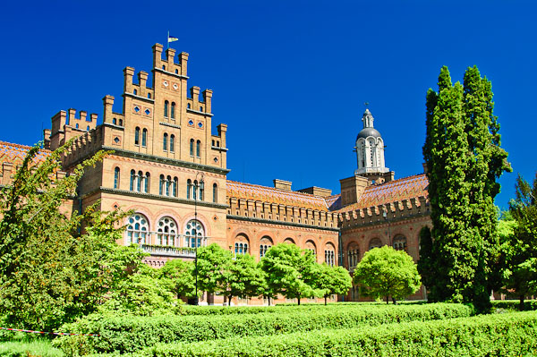 Корпус митрополита